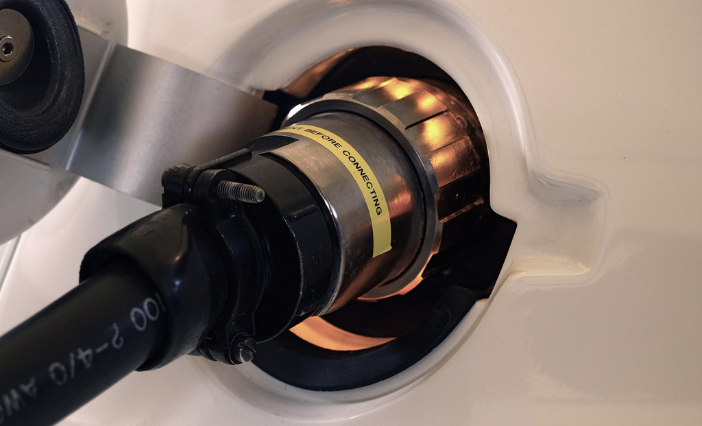 Tesla Electric Roadster